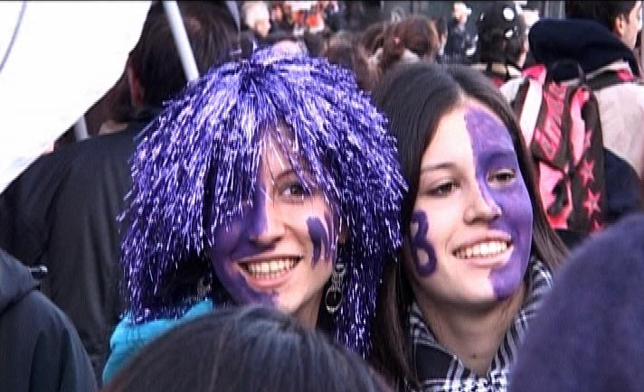 Ragazze in viola